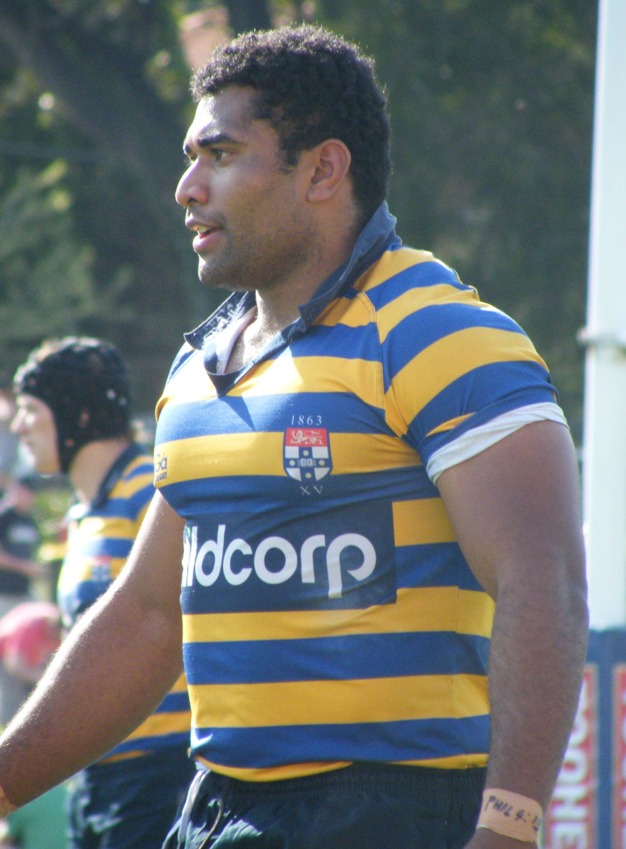 Sydney Uni RUFC Prop